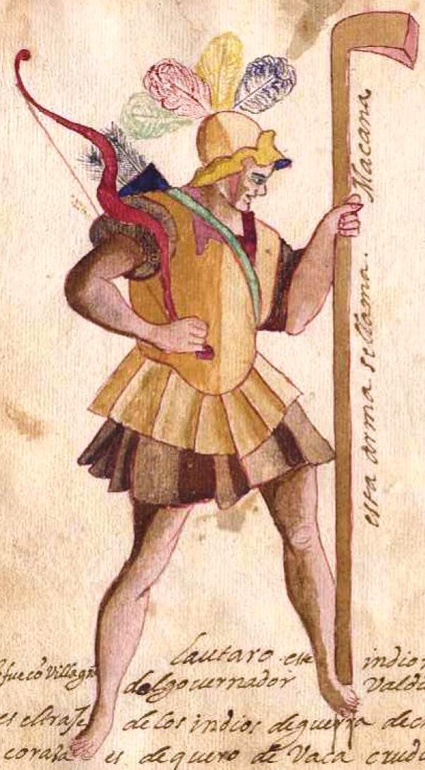 Lautaro, ca. 1534-1557. Imágen de Lautaro del siglo XVI